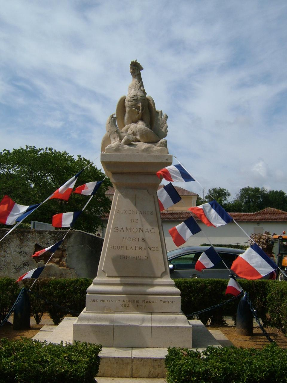 Samonac, Gironde (France) ; monument aux morts, érigé en 1920, le 14 juillet 2011.